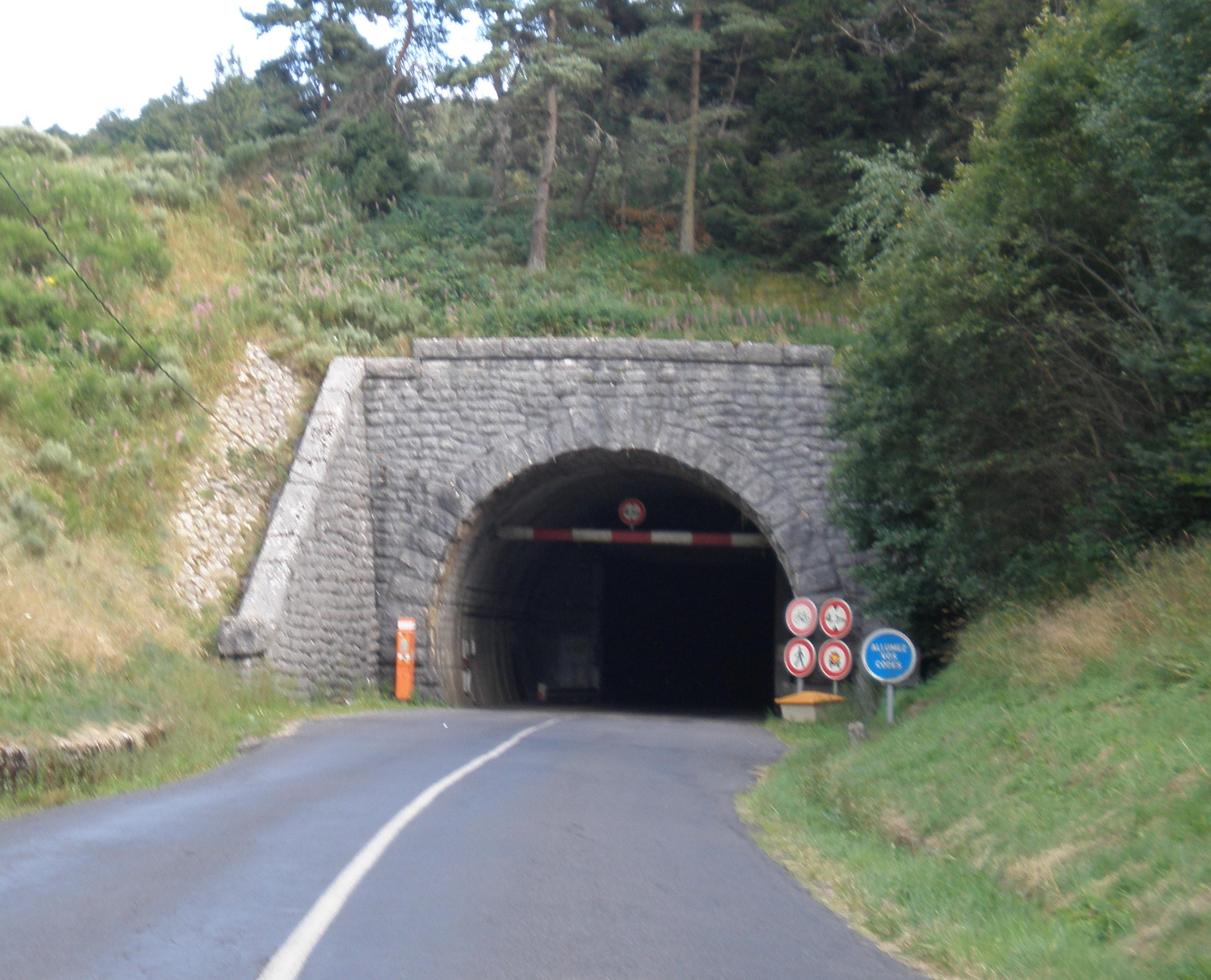 L'entrée du tunnel du Roux (Ardèche) côté Saint-Cirgues-en-Montagne